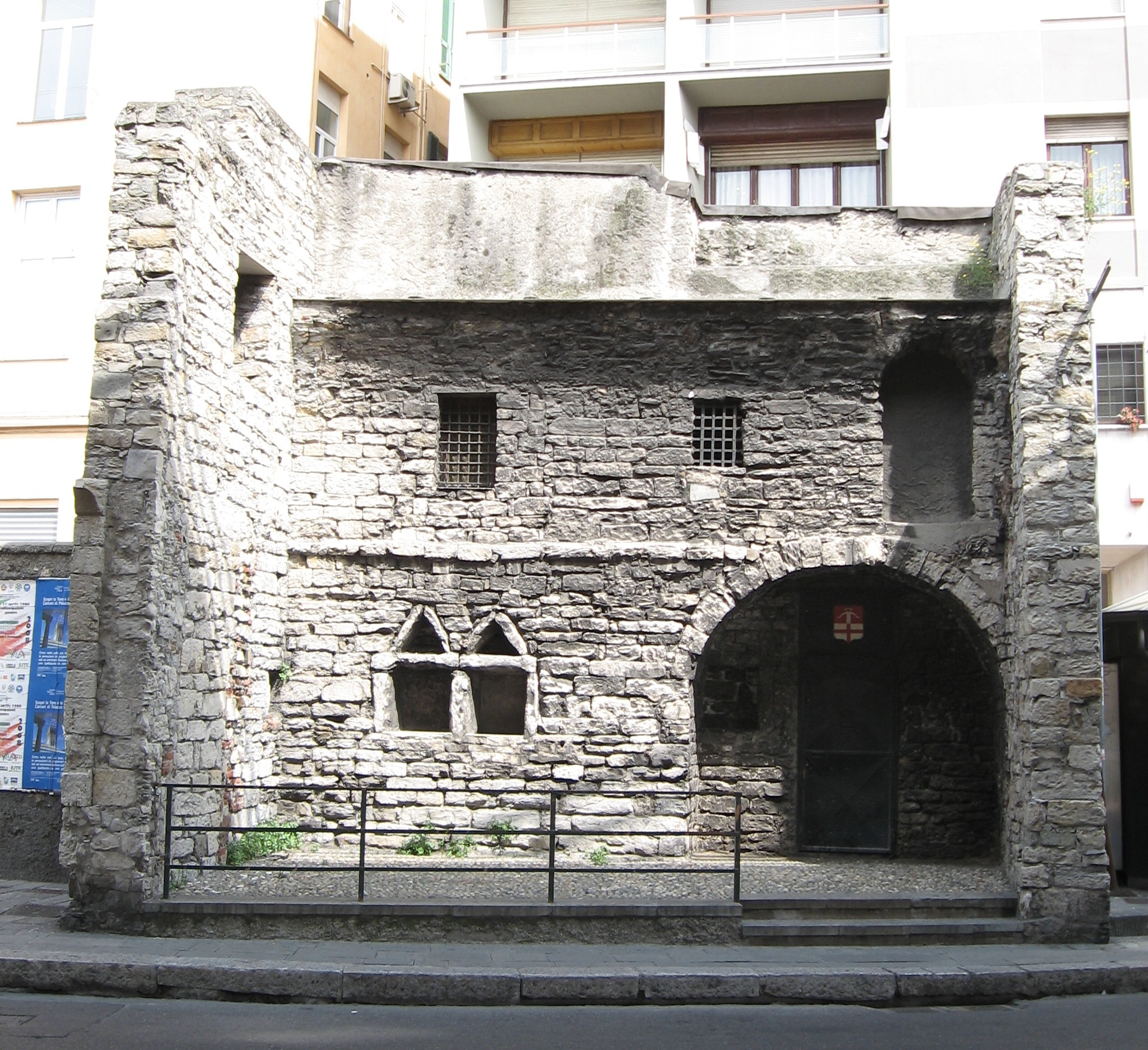 Casa del Boia, Genova, Italia